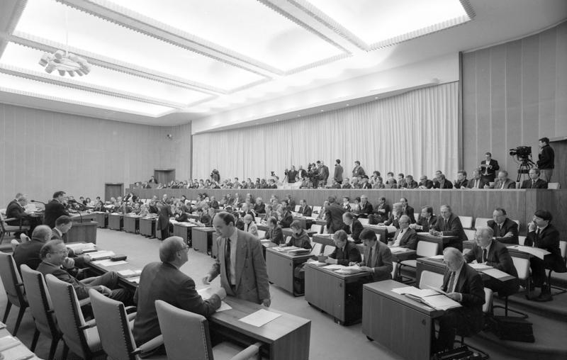 Bonn, 14.12.1990 In der ersten Sitzung des gesamtdeutschen Bundesrates in Bonn traf die Länderkammer die Entscheidung, die Beamtenbesoldung in den neuen Bundesländern für den Bereich der leitenden Beamten zu verbessern. Die neuen Bundesländer sollen ermächtigt werden, die im Einigungsvertrag vorgesehenen 35% eines entsprechenden westdeutschen Gehaltes durch einen nicht ruhegehaltsfähigen Zuschuß von 14% aufzustocken. Die Entscheidung des Bundesrates muß durch die Bundesregierung in Kraft gesetzt werden.